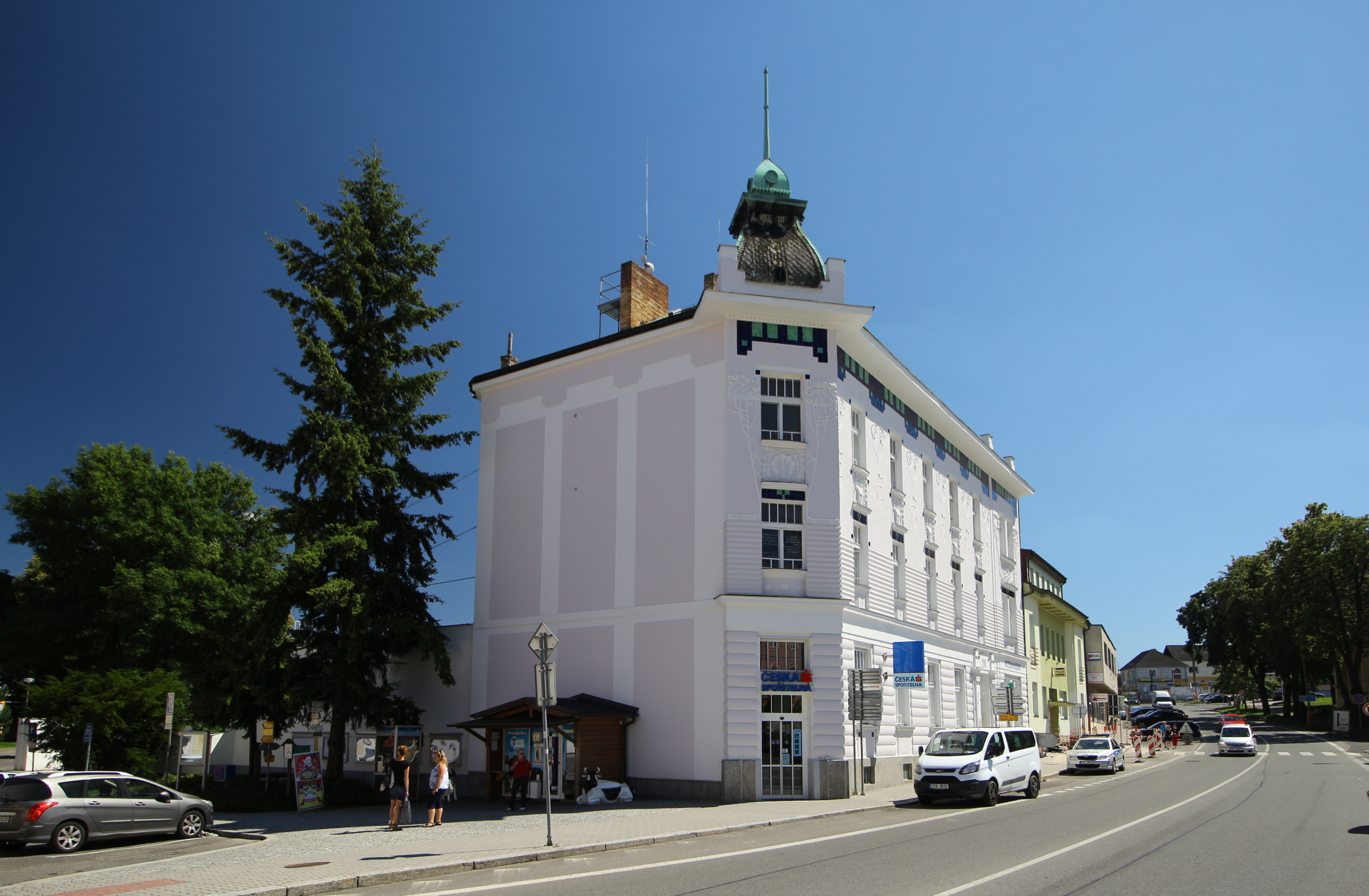 Milevsko náměstí a okolí